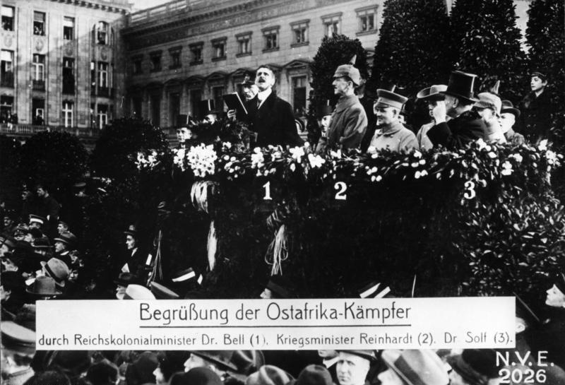 Begrüßung der Ostafrika-Kämpfer durch Reichskolonialminister Dr. Bell (1), Kriegsminister Reinhardt (2), Dr. Solf (3)